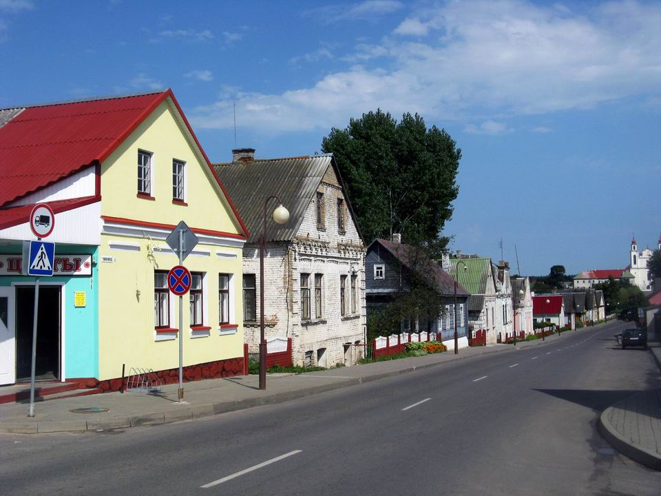 Беларуская (тарашкевіца): Іўе